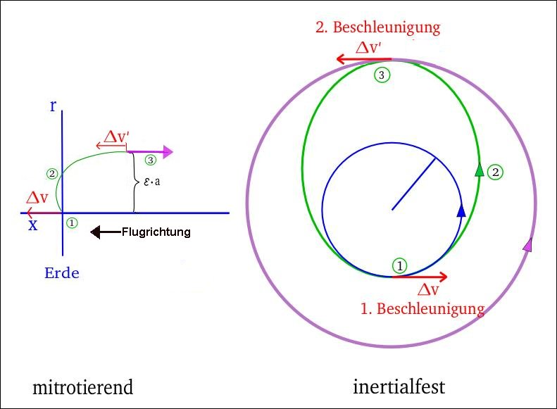 Hohmannmanöver